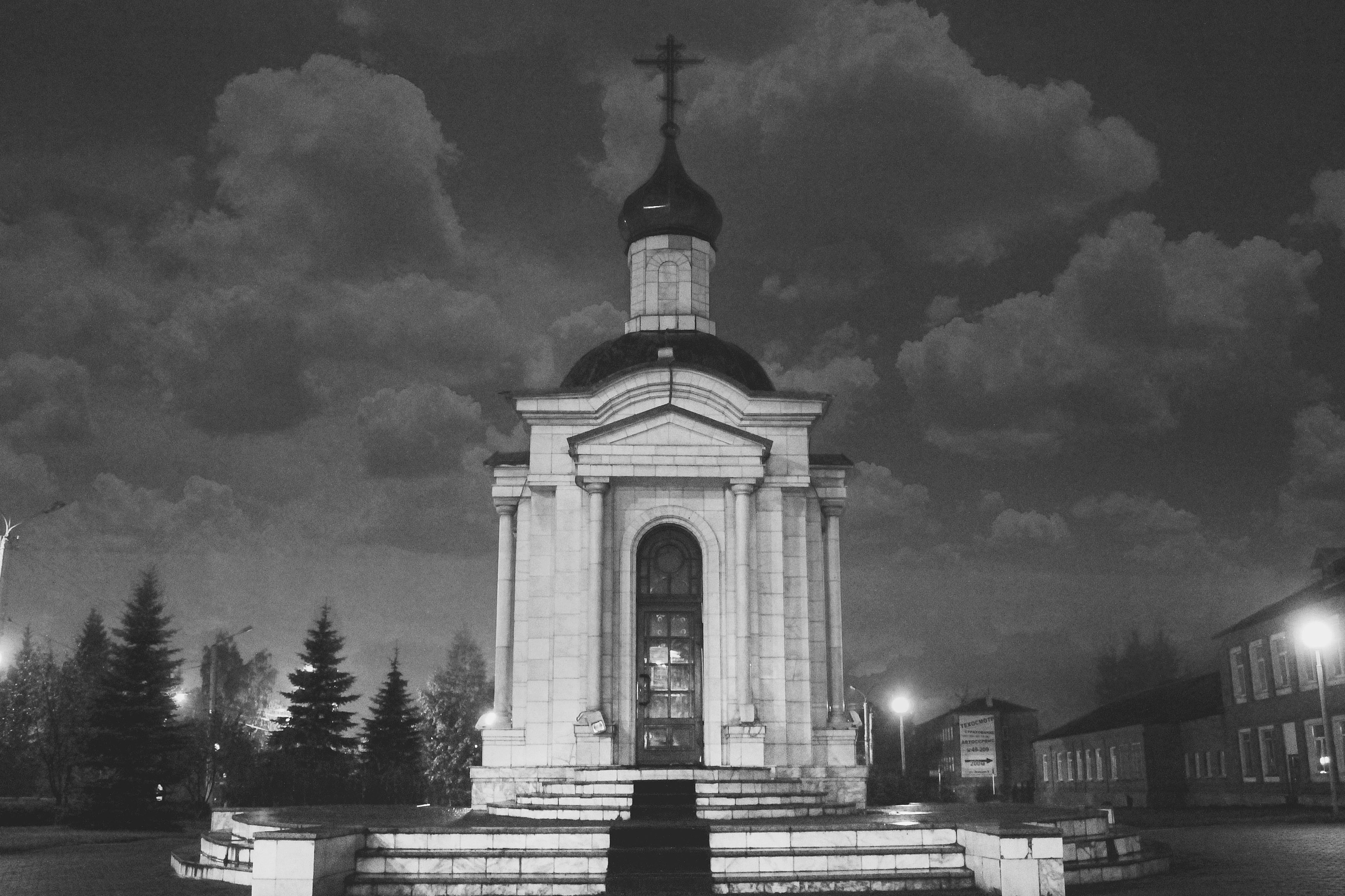 Часовня в честь иконы Божией Матери Всех Скорбящих Радость памяти погибших шахтеров: проспект Кирова, сквер Памяти, Ленинск-Кузнецкий, Кемеровская область